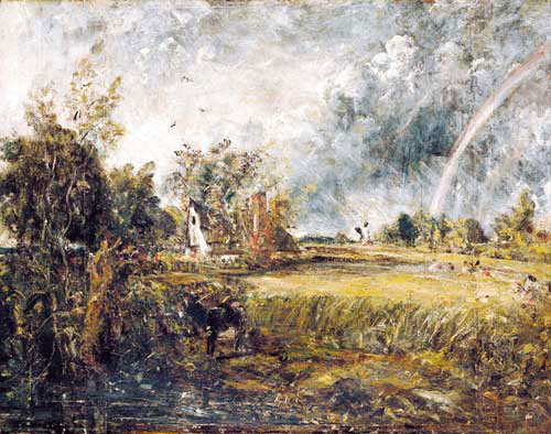 Un bâtiment est enfoui sous la végétation encore secouée par des bourrasques, juste après l'orage (un arc-en-ciel double apparaît à droite)